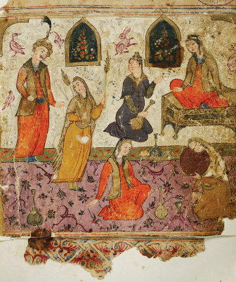 იოსებზილიხანიანი (S-1283)